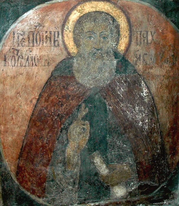 Пахомий Нерехтский, святой Русской Православной Церкви.